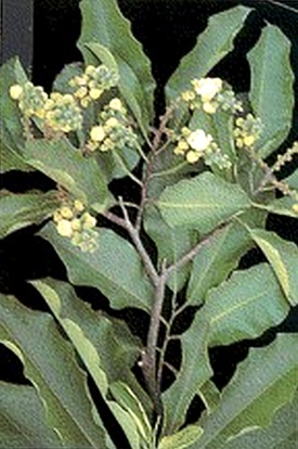 Bertholletia excelsa